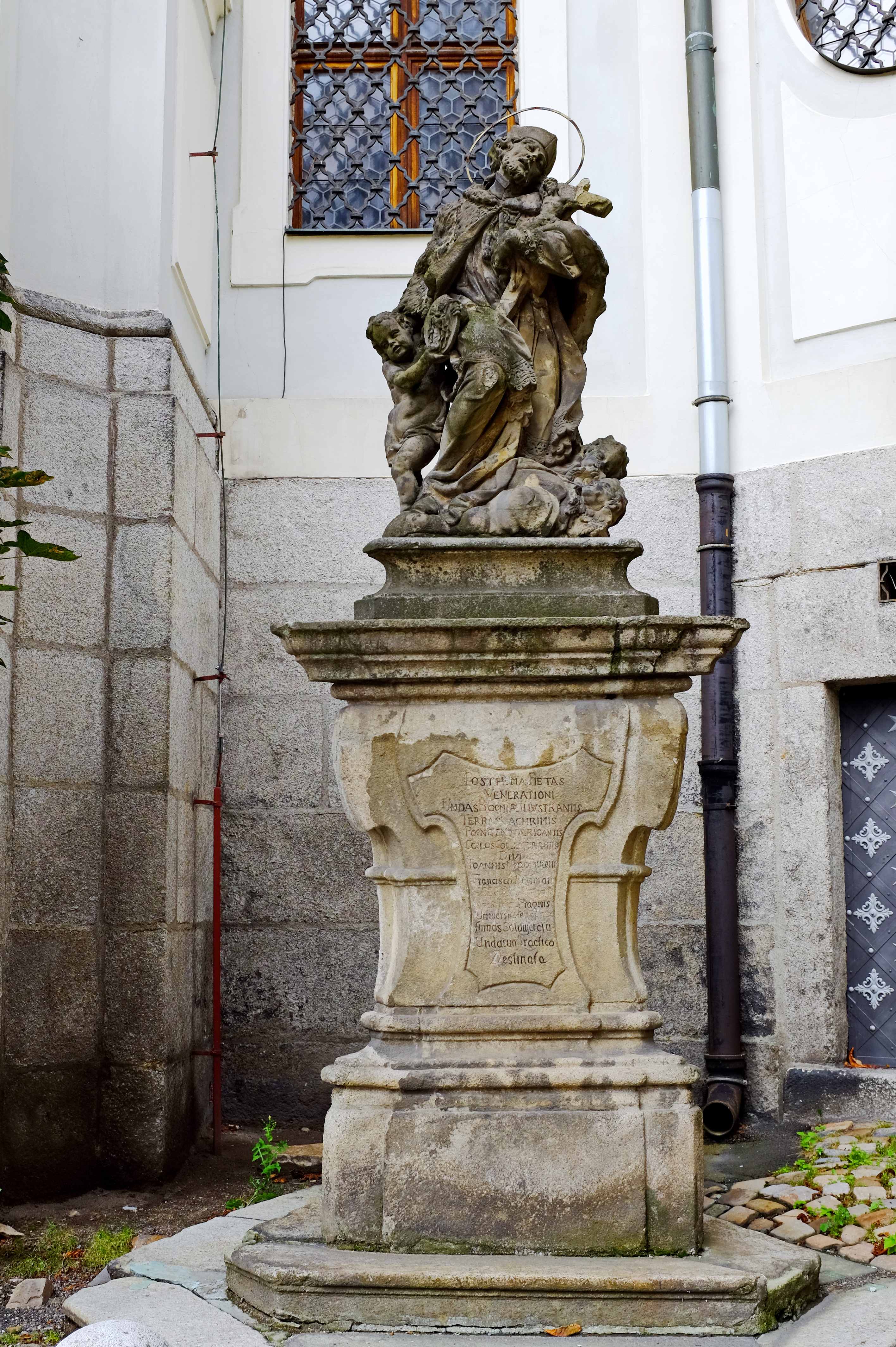 Socha svatého Jana Nepomuckého, mezi řekou Teplá a Smetanovými sady, Karlovy Vary.